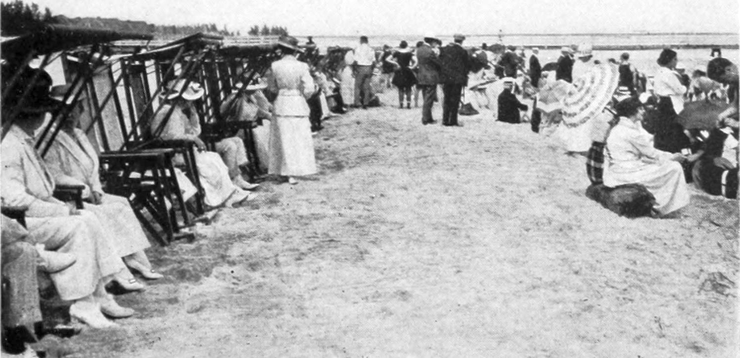 Palm Beach, Florida.